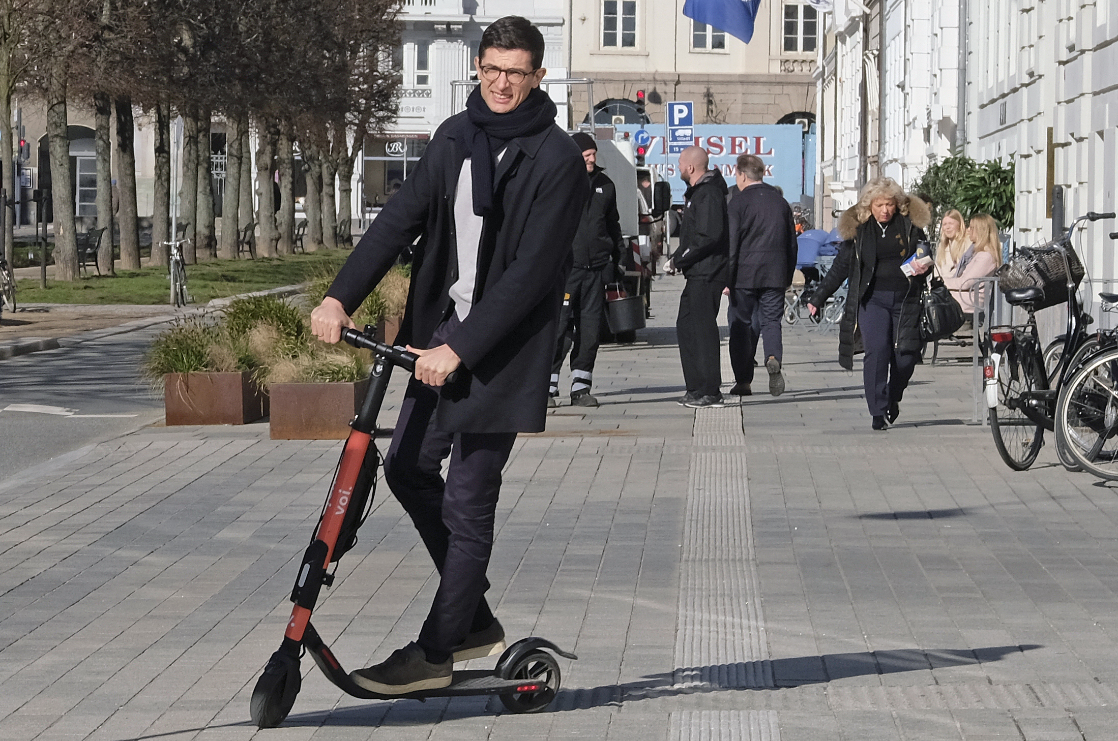 Kristian Yde Agerbo, head of public policy & market development på svenska företaget VOI som via en app etablerat delningskoncept med eldrivna scootrar / elløbehjul i flera europeiska städer, däribland Köpenhamn, Malmö och Stockholm. Fotograferad vid Sankt Annæ Plads i Köpenhamn. Photo: News Øresund Johan Wessman. © News Øresund Johan Wessman (CC BY 3.0). Detta verk av News Øresund är licensierat under en Creative Commons Erkännande 3.0 Unported-licens (CC BY 3.0). Bilden får fritt publiceras under förutsättning att källa anges. .The picture can be used freely under the prerequisite that the source is given. News Øresund, Malmö, Sweden.News Øresund är en oberoende regional nyhetsbyrå som är en del av det oberoende dansk-svenska kunskapscentrat Øresundsinstituttet.